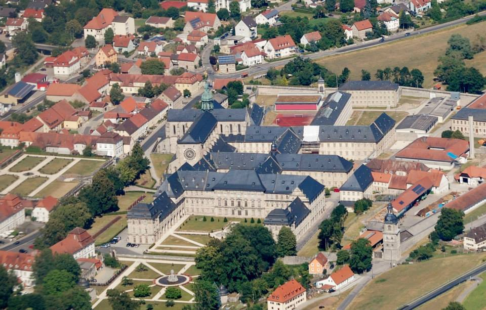 Gesamtanlage des Klosters Ebrach (2013)